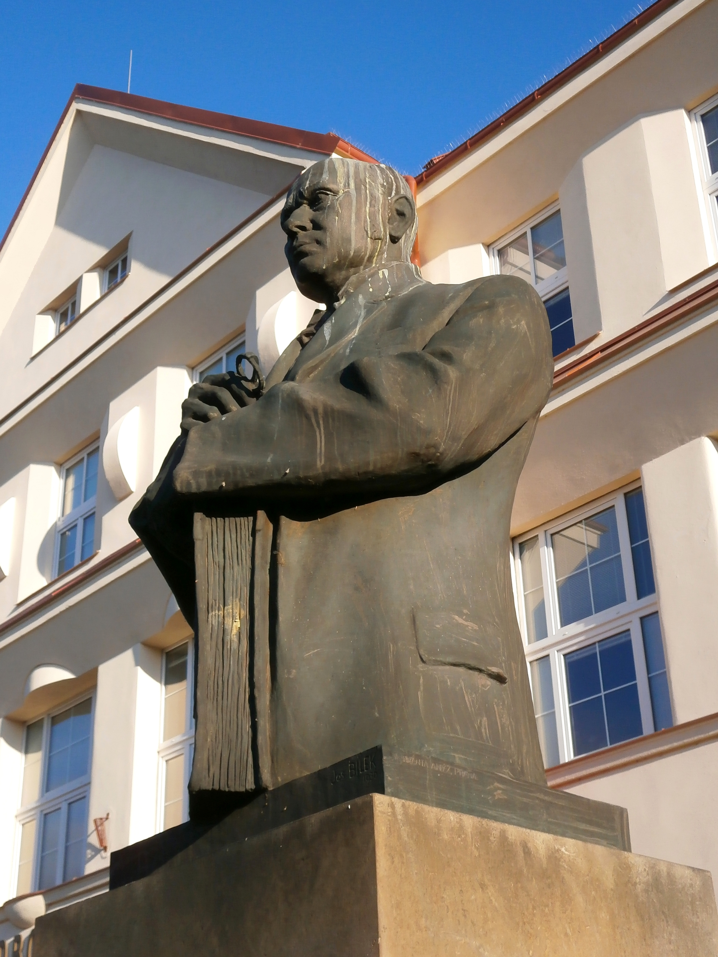 Pomník A. Švehly